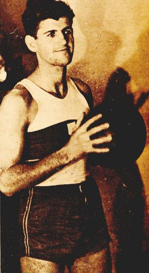 Ken Davidson basquetbolista de Universidad Católica